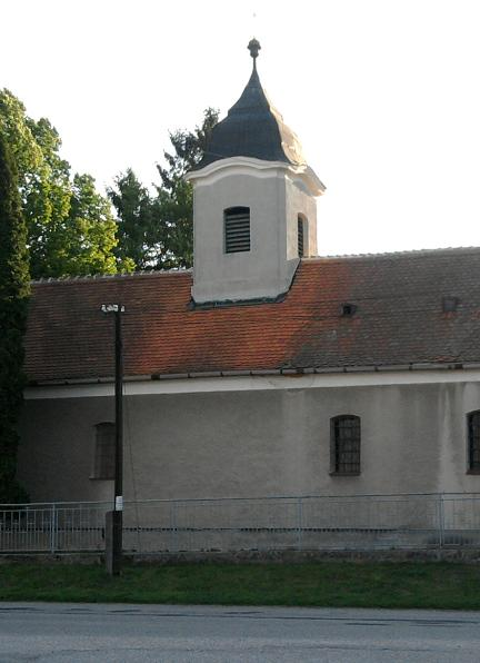 Kostol v Alekšinciach pri Nitre